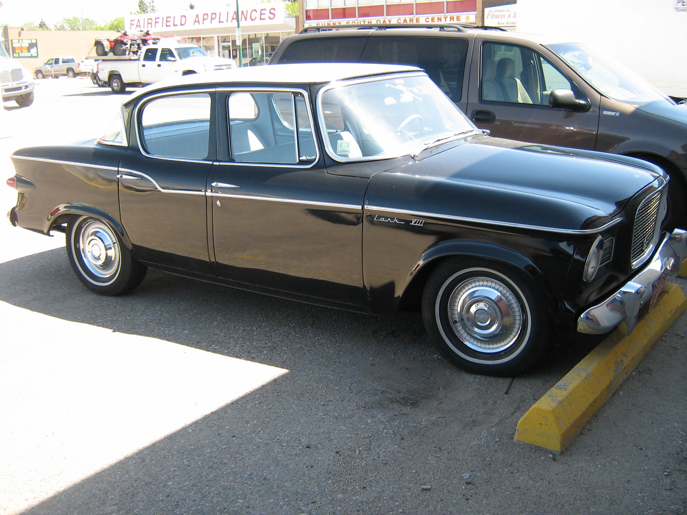 1960 Studebaker Lark VIII